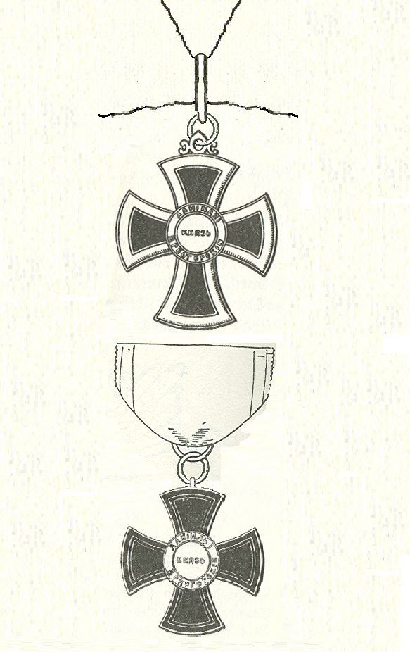 Twee onderscheidingen Orde van Danilo